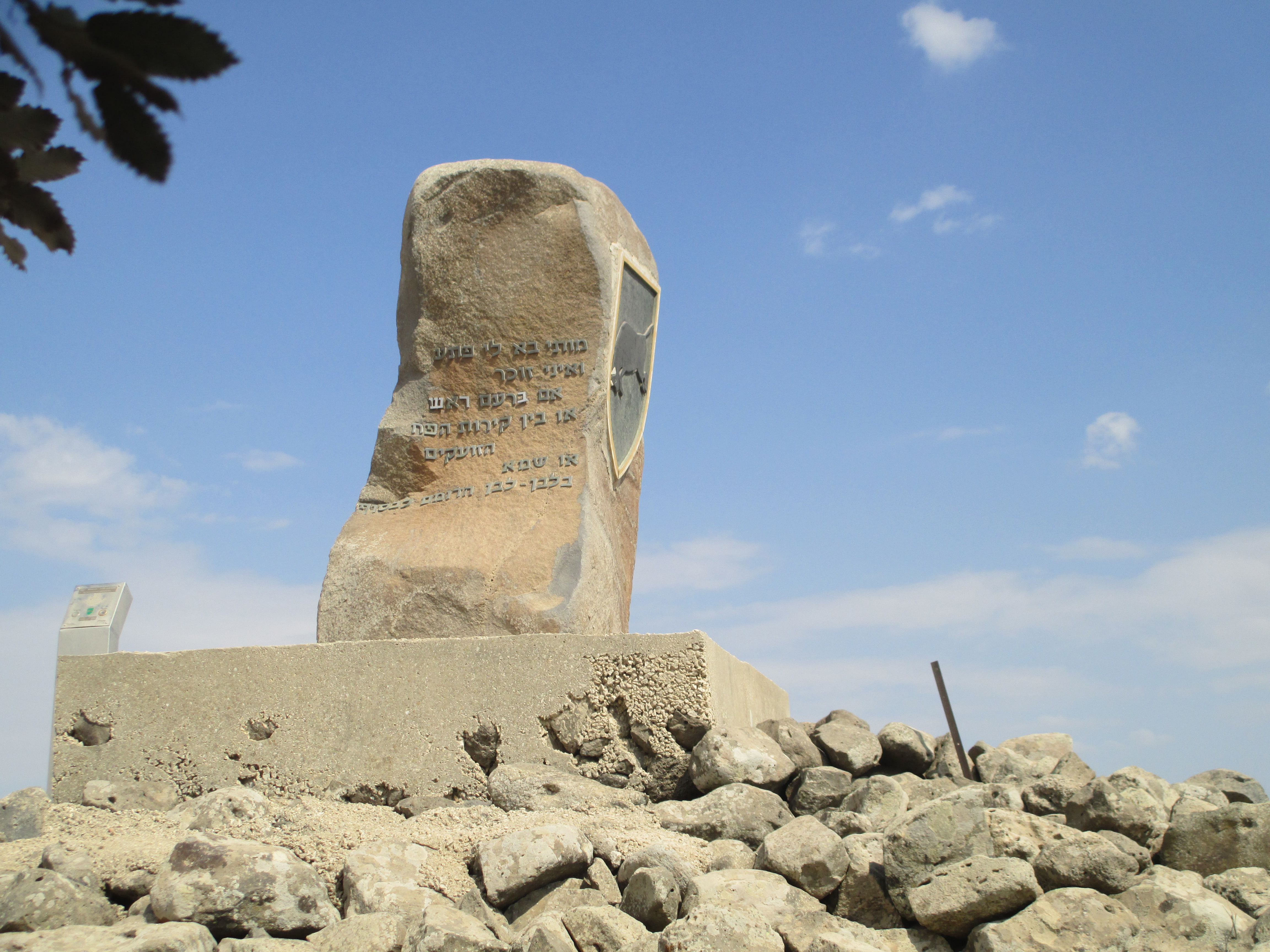 אנדרטת חטיבה 179 בגולן